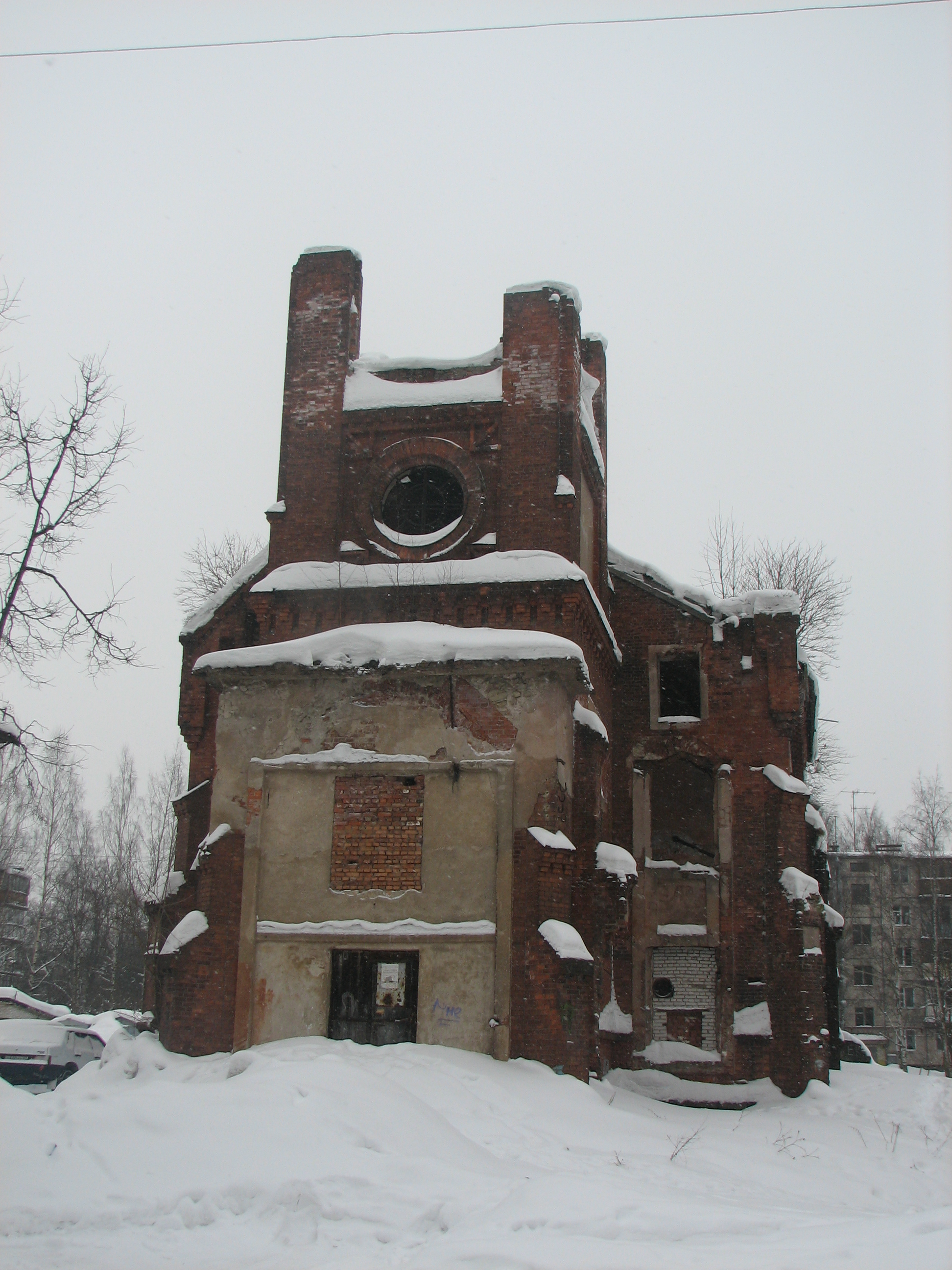 Руины церкви Пресвятой Девы Марии Кармельской в Гатчине со стороны улицы Володарского зимой 2011 года